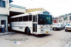 autobus Thomas Built Buses en los 80's